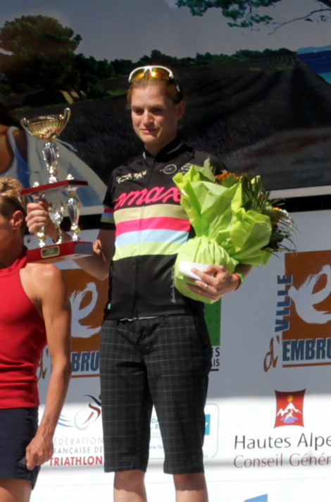 Eimear Mullan 1er féminine Embrunman 2014